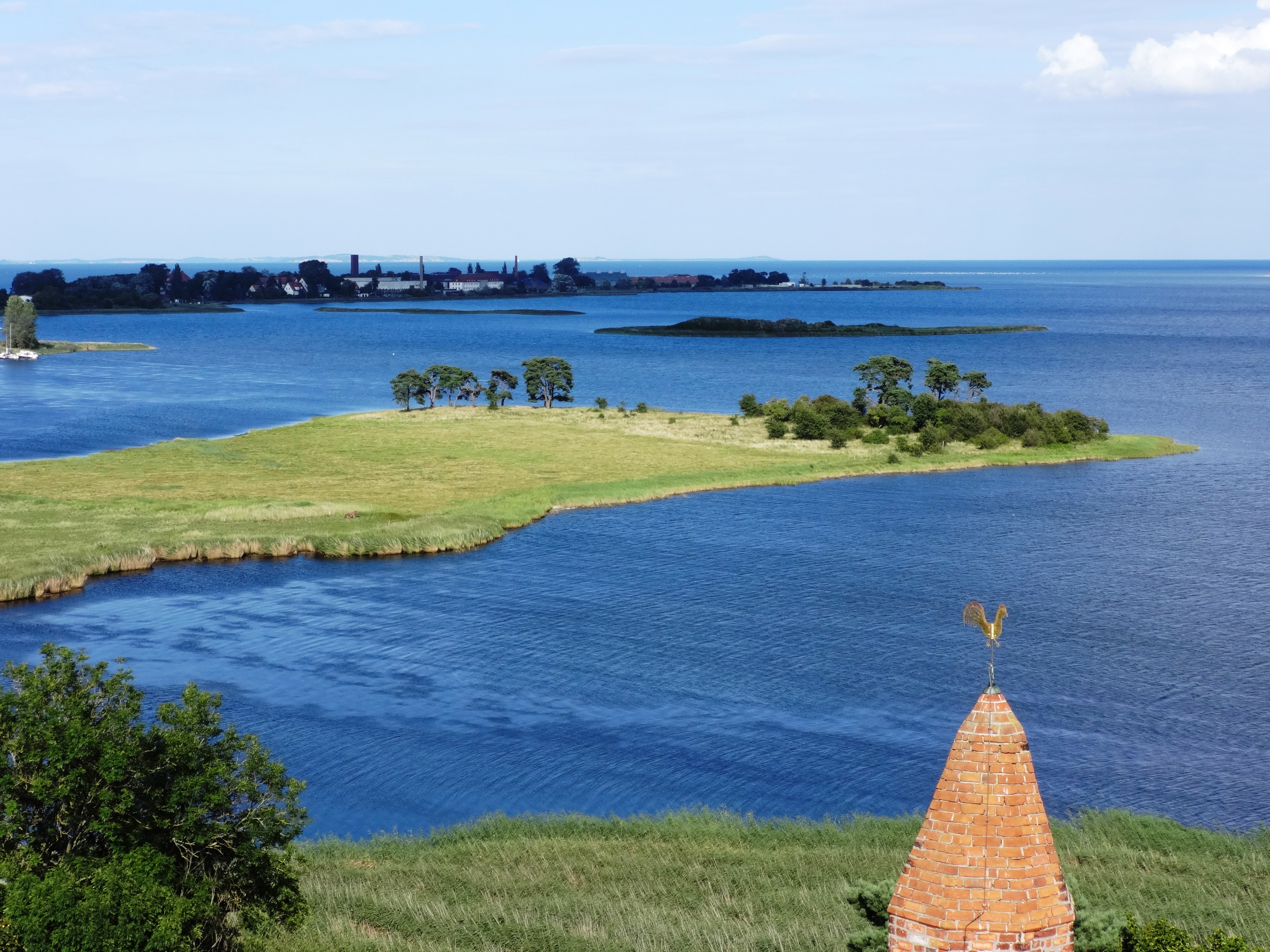 Kirche in Gristow aus der Mitte des 14. Jahrhunderts, basierend auf einem Vorgängerbau von 1280 in Mecklenburg-Vorpommern